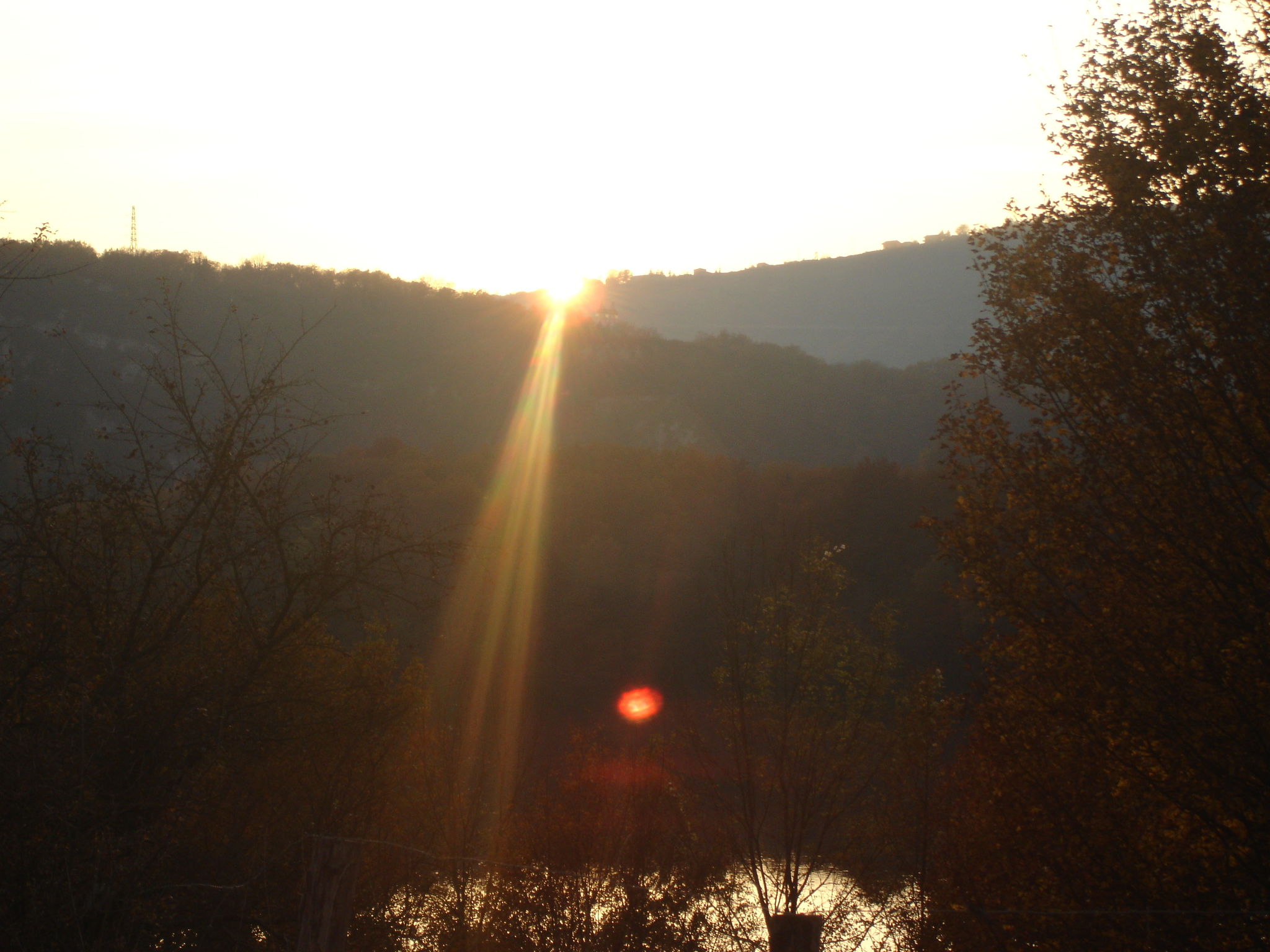 Coucher de soleil sur la rivière d'Ain vers le barrage de Cize-Bolozon.